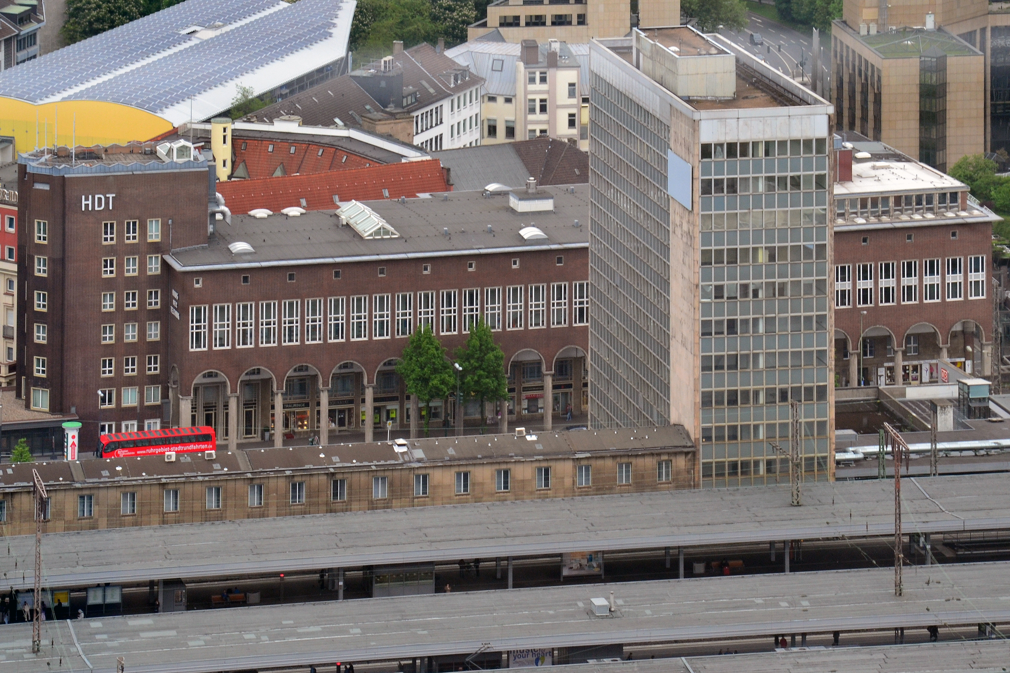 Haus der Technik (Essen), Sicht vom RWE-Turm